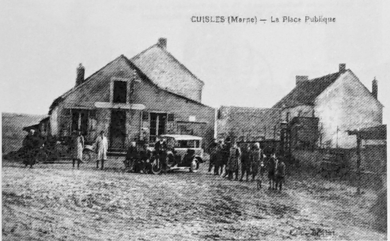 sur une carte postale du début du XXe siècle.